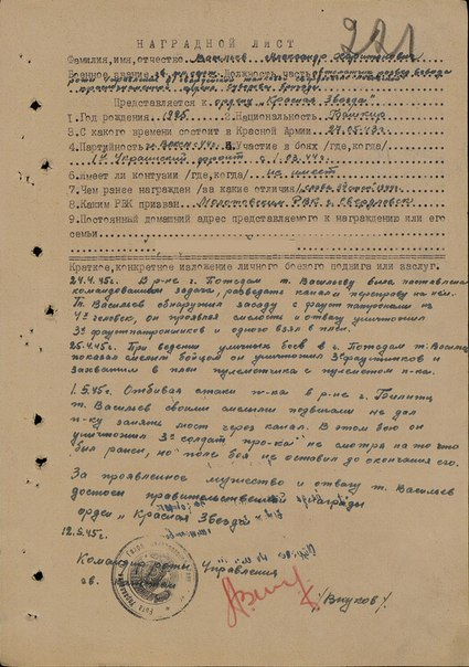 Наградной лист